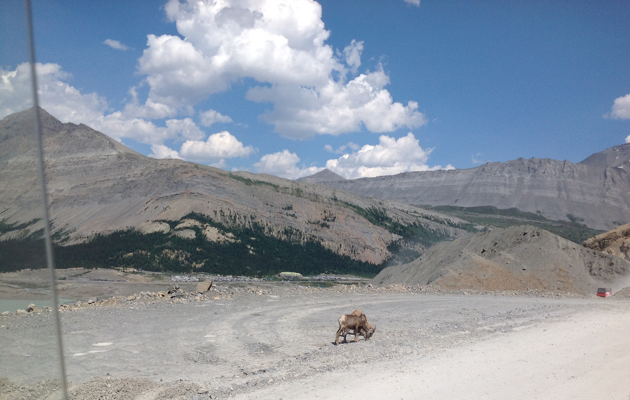 Srpski (latinica): Deo faune na Atabaska glečeru, Kanada